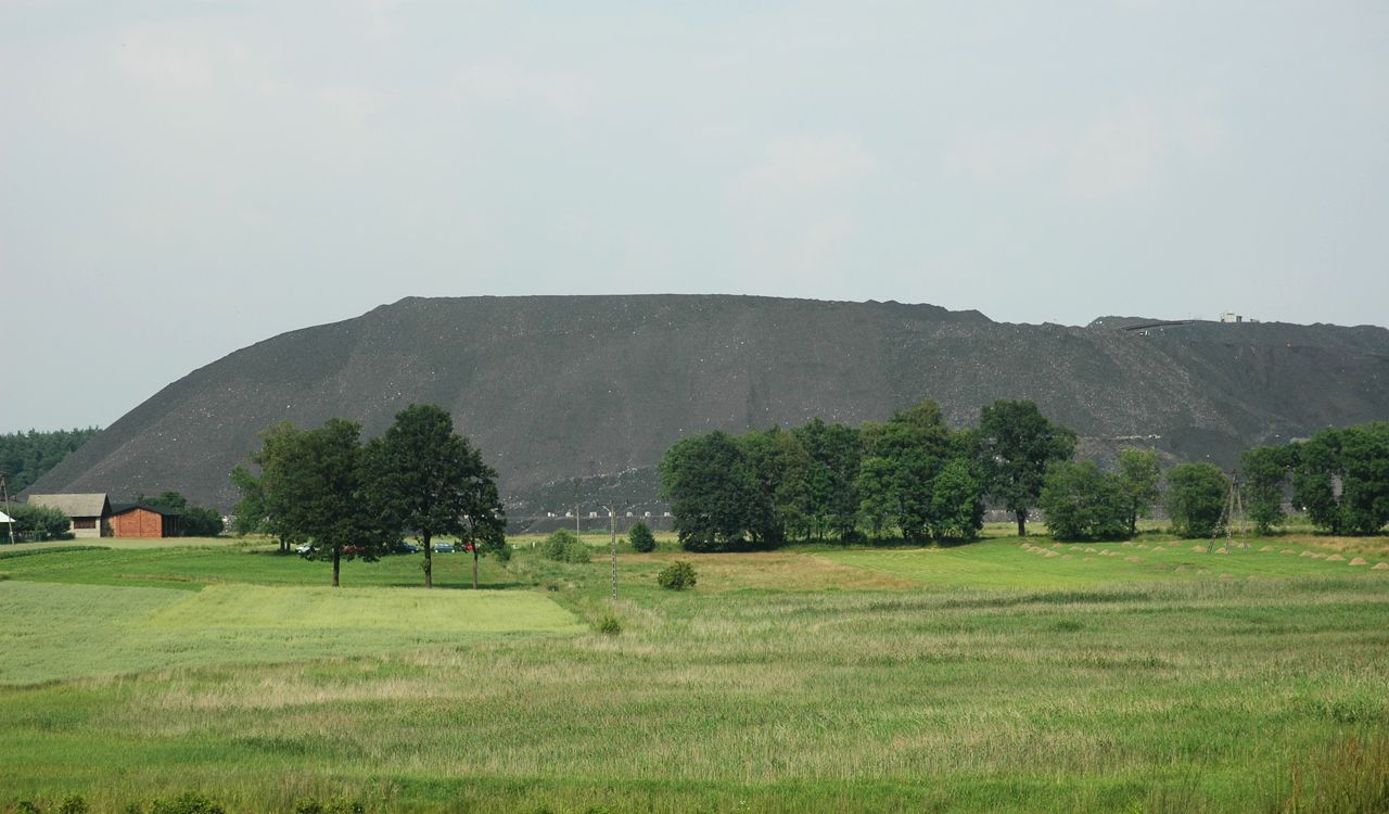 Halda Dolu Krupiński, Suszec, Polsko